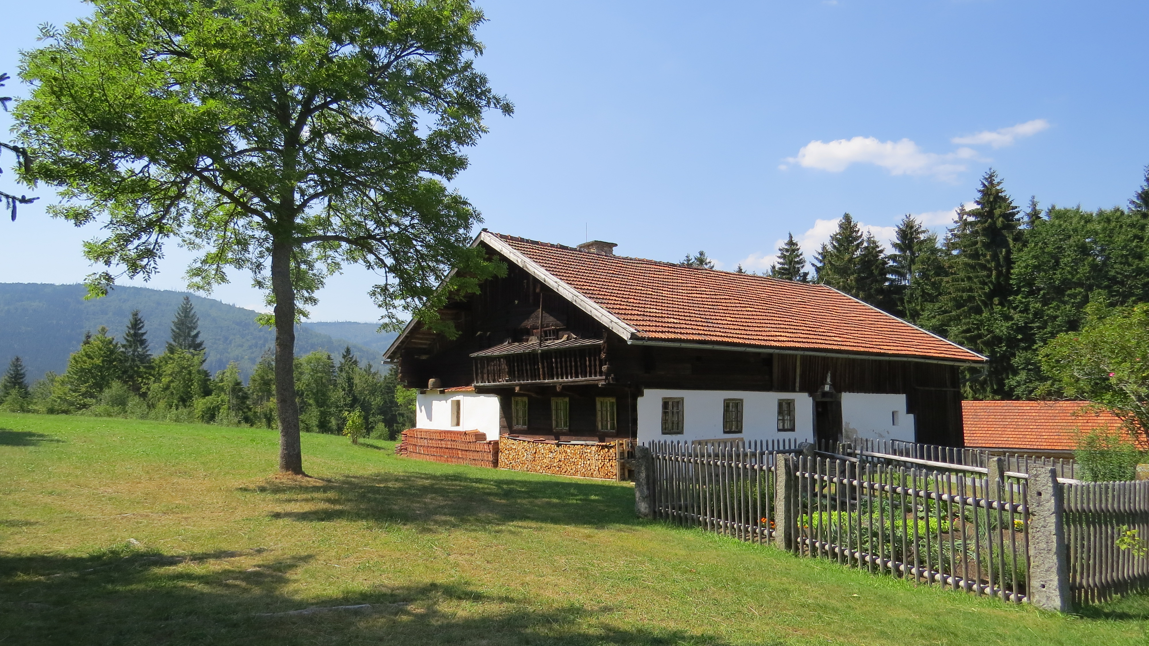 Das Sachl im Freilichtmuseum Finsterau, Mauth